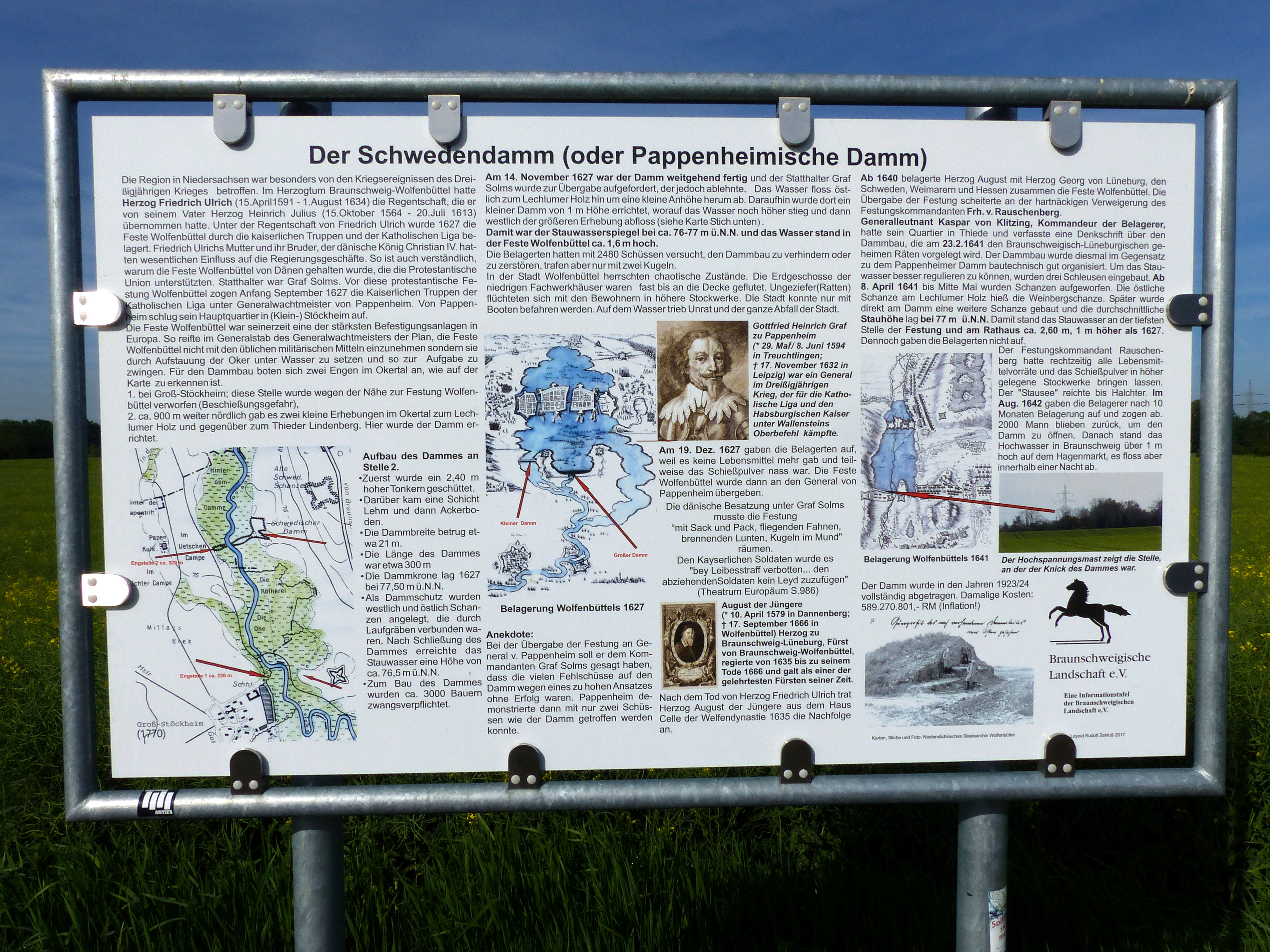 Informationstafel am ehemaligen Schwedendamm in Wolfenbüttel, aufgestellt von der Braunschweigischen Landschaft mit Texten und Layout von R. Zehfuß